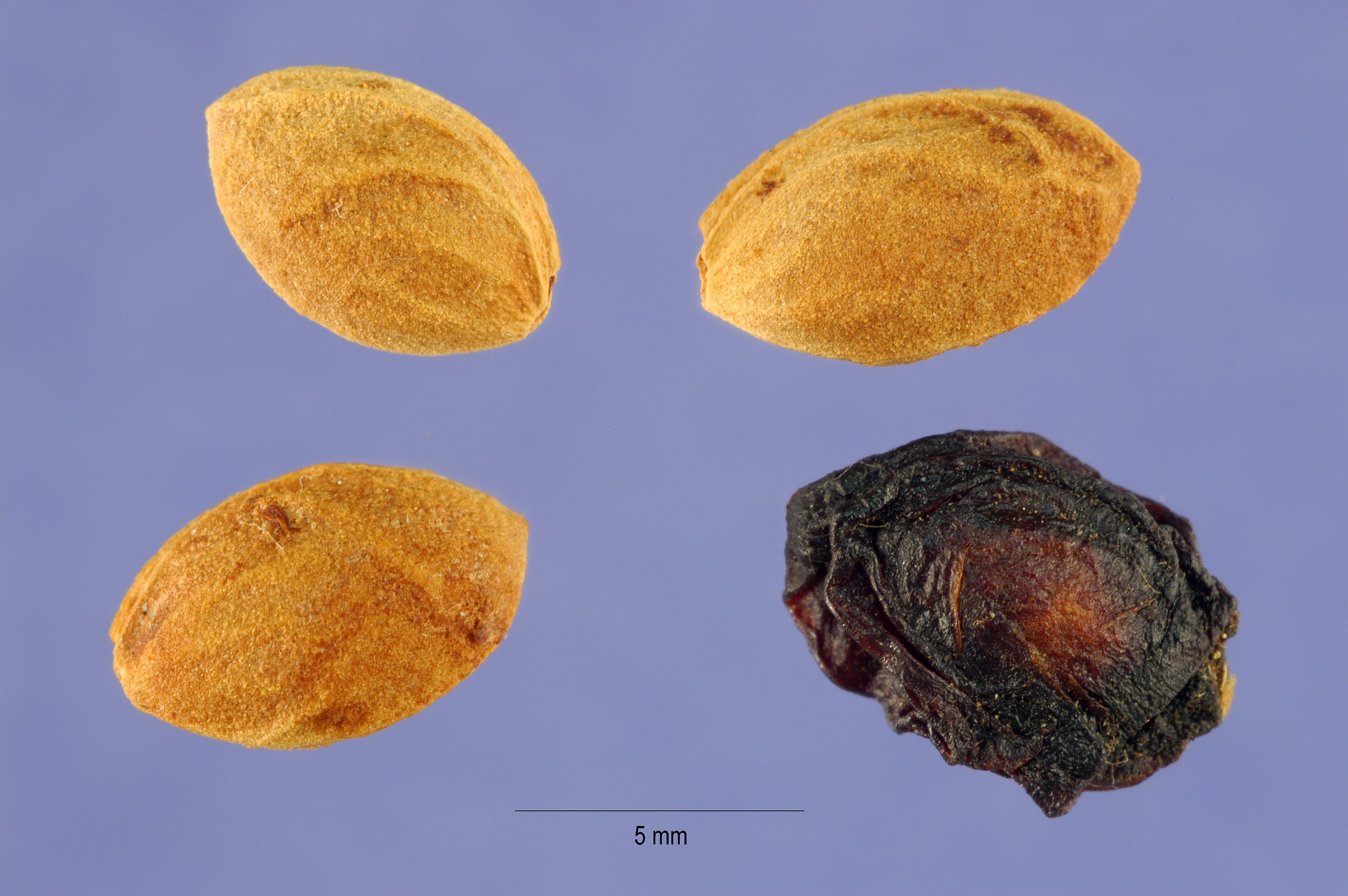 Prunus emarginata seeds